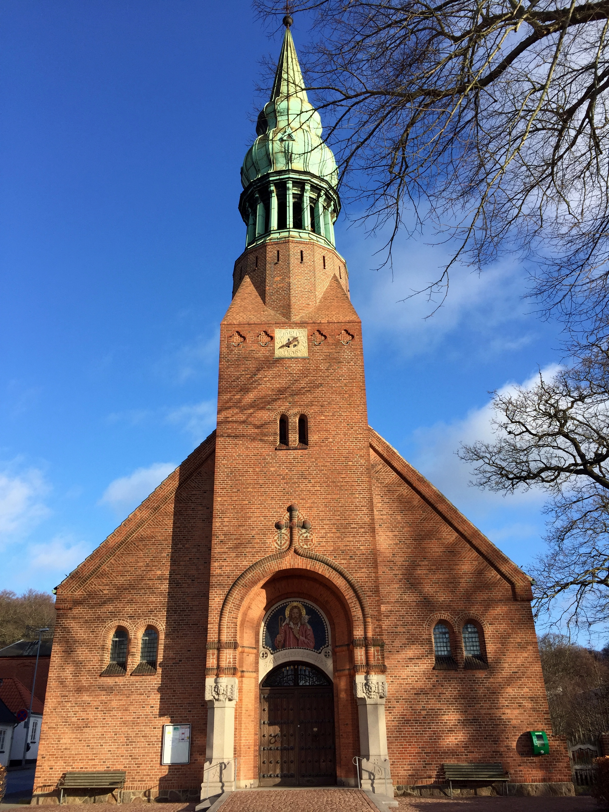 Frederiksværk Kirke